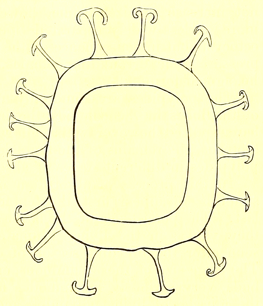 Statoblast of Pectinatella magnifica from Mystic Point near Cambridge, Mass., USA.